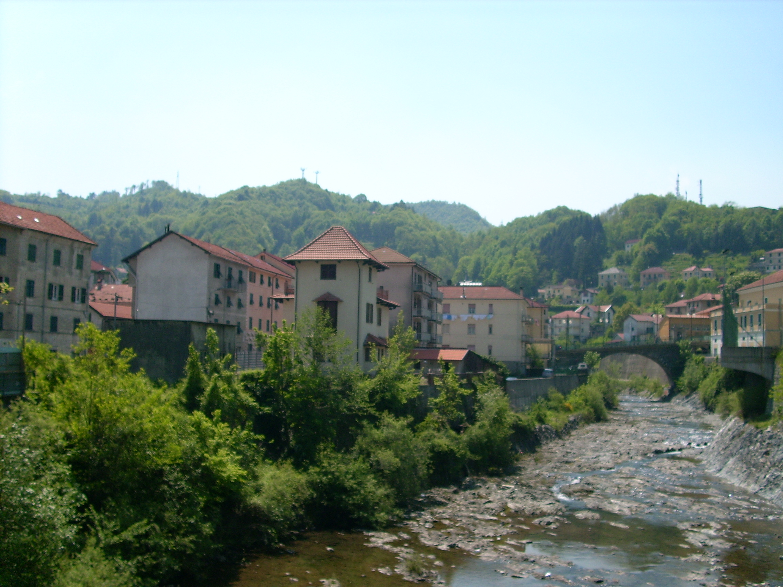 Panorama dal fiume Stura, Masone, Liguria, Italia